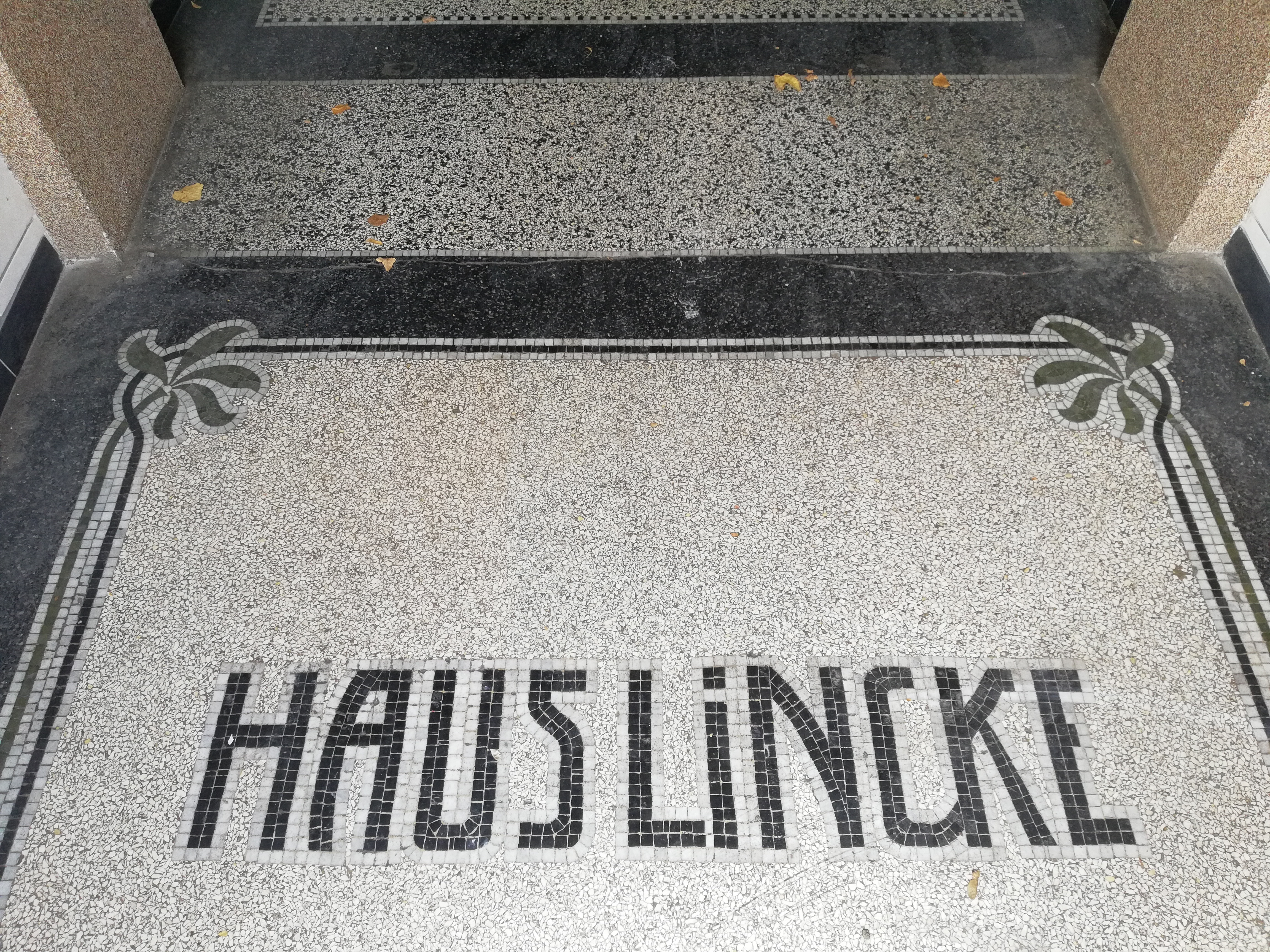 In verhaltenem Jugendstil in den Terrazzo-Fußbodenbelag eingelassenes Mosaik mit dem Schriftzug „Haus Lincke am Engelbosteler Damm 1 Ecke Oberstraße in der Nordstadt von Hannover ...“